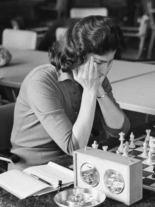 Dames schaakwedstrijden in de Kroon 1962, Chaude de Silans.